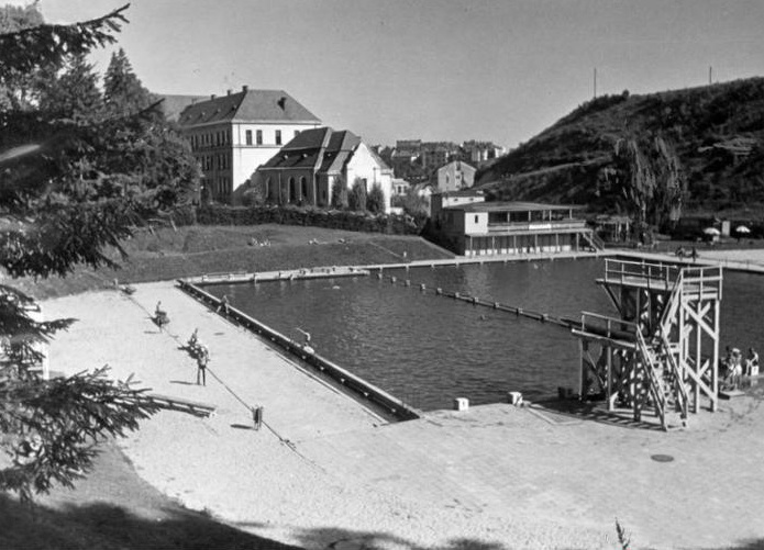 Басейн "На Залізниих Водах". Репродукція фото до 1939 року. Львів, вул.В.Стуса.